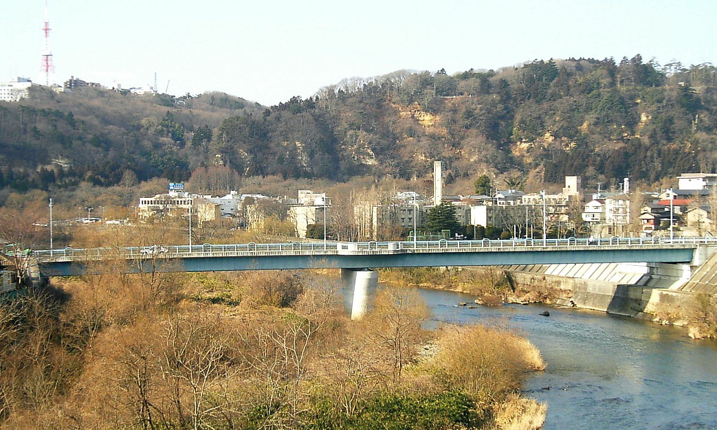 Hyōjōgawara Bridge. Sendai, Miyagi prefecture, Japan.